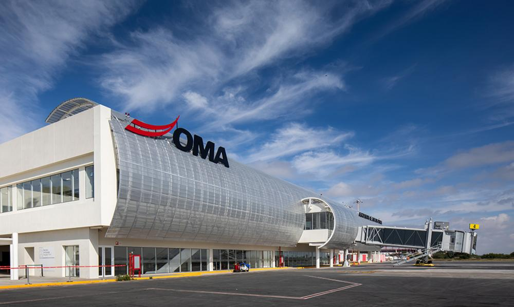 Avión de Volaris en la plataforma del Aeropuerto de San Luis Potosí